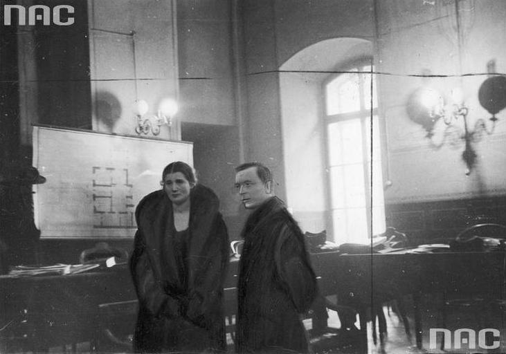 Odkarżona Rita Gorgon i jej adwokat Mieczysław Ettinger podczas procesu (marzec - kwiecień 1933)